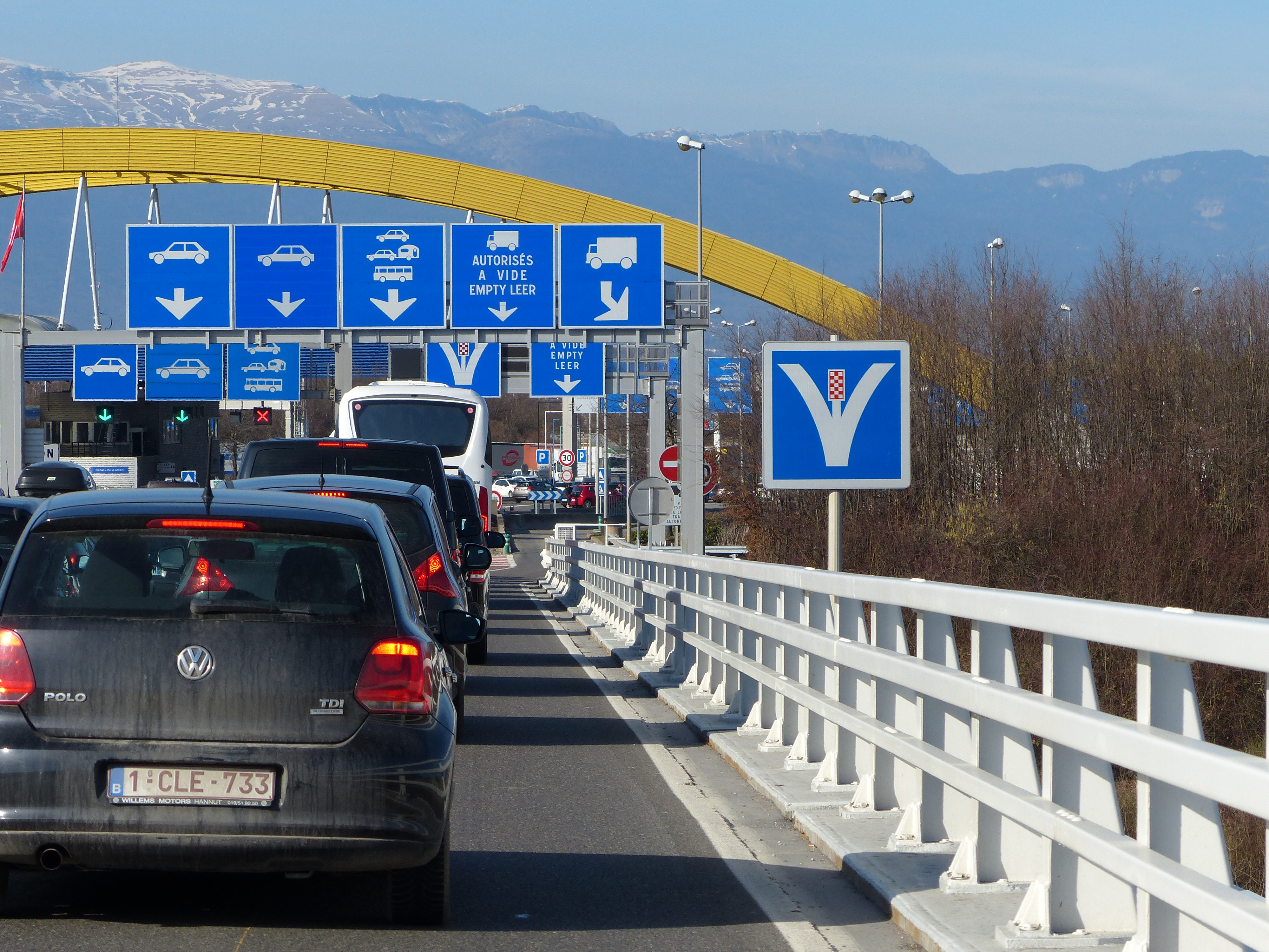 Panneau C26c, autoroute A41, Saint-Julien-en-Genevois, Haute-Savoie, France.